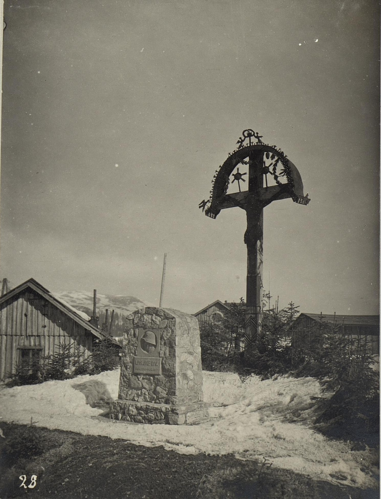 Denkstein a.Prislog der 1.Preus.Inftr.Dion.